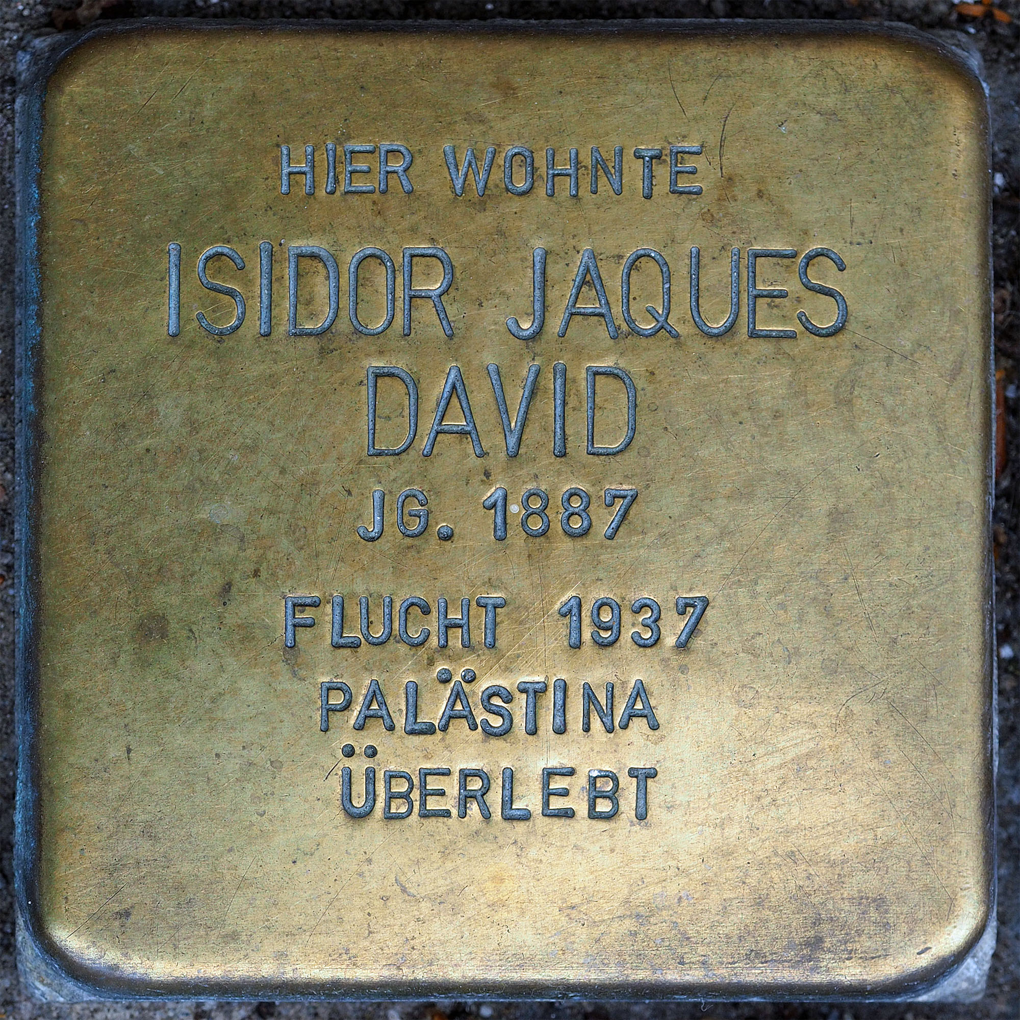 Stolpersteine Wesel: David, Isidor-Jaques